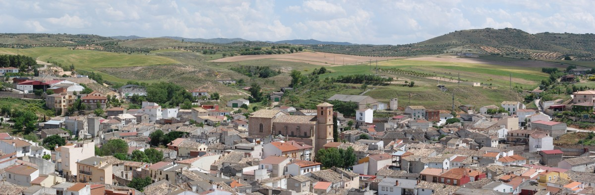 Vista panorámica de Illana (Guadalajara) desde el cerro Chichagatos